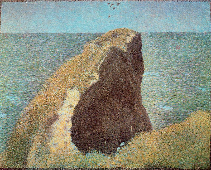 Le Bec du Hoc à Grandcamp, h/tl, 66x82,5 cm, Tate Gall., London